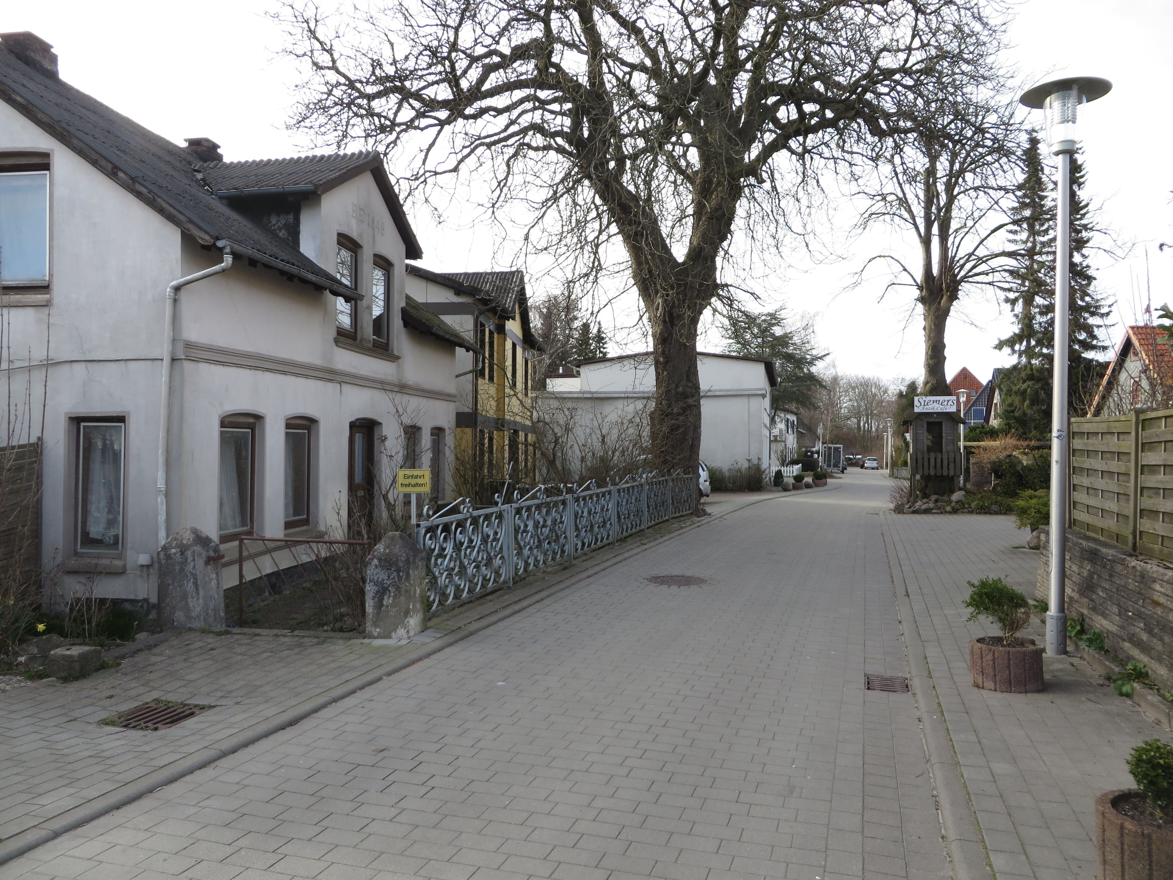 Die Straße Blasberg (Flensburg 5 April 2015), Bild 01